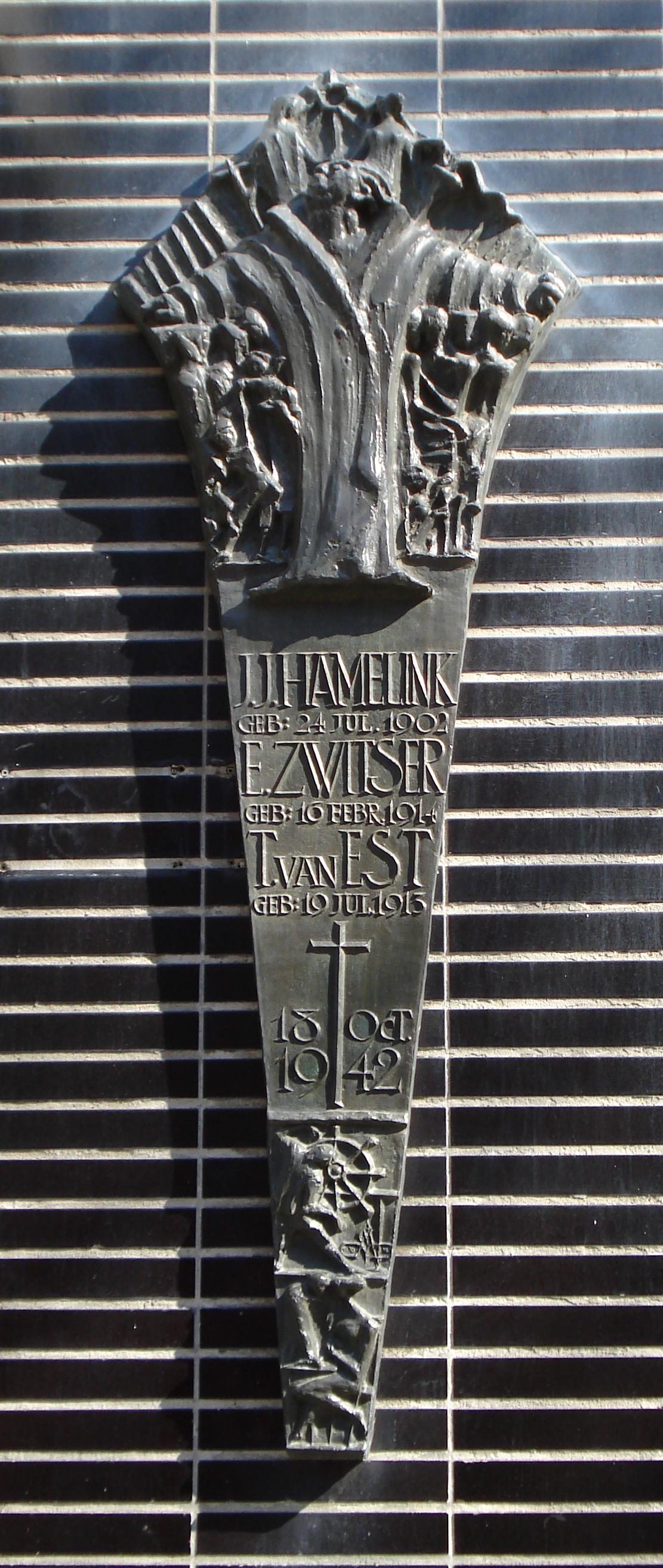 Rotterdam Noord, 1e Pijnackerstraat. Kunstwerk/monument "Geloof en vrijheid" van Loekie Metz. Rotterdam/The Netherlands.